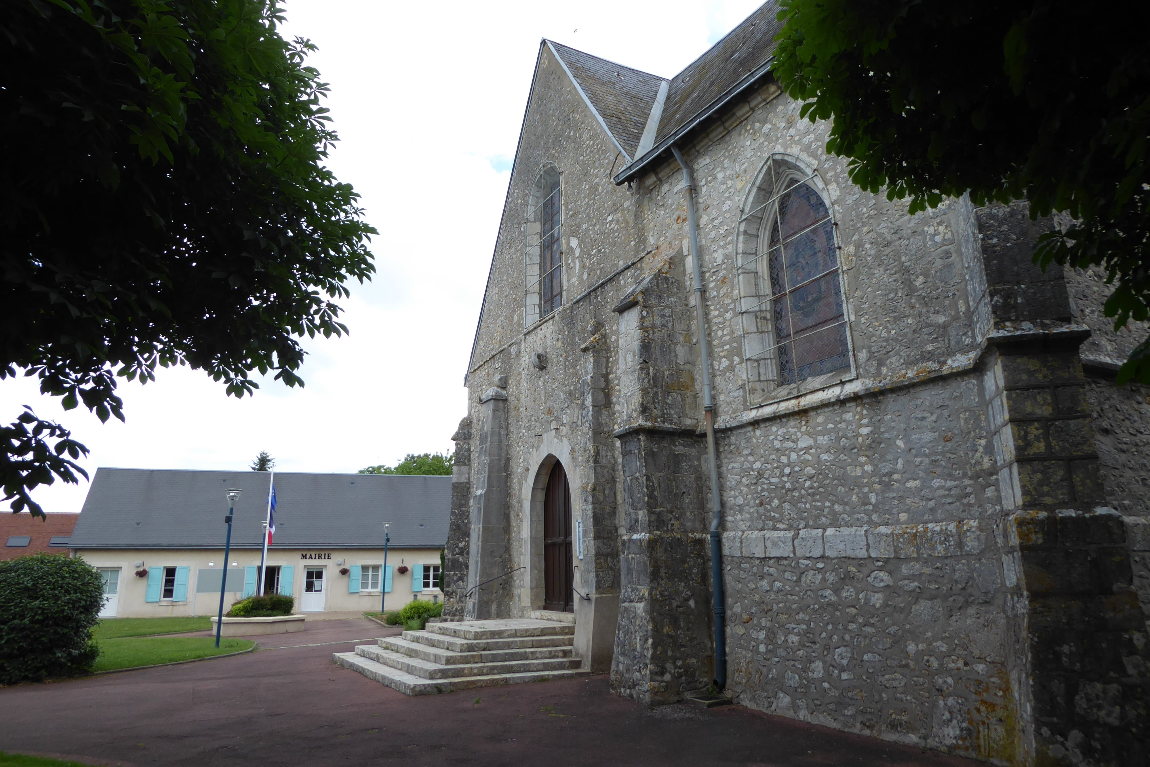 mairie et église Saint-Étienne du Gault-Saint-Denis, Eure-et-Loir, France.